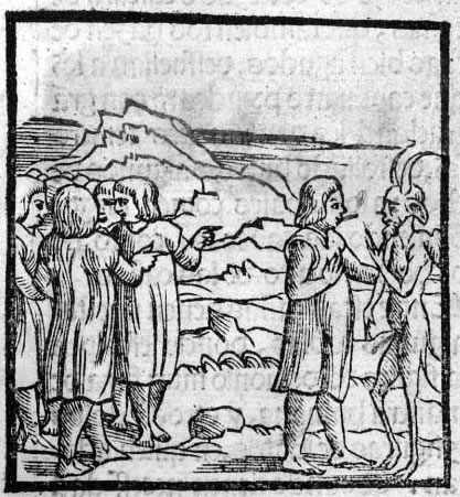 Первое европейское изображение правителя Инков, 1553